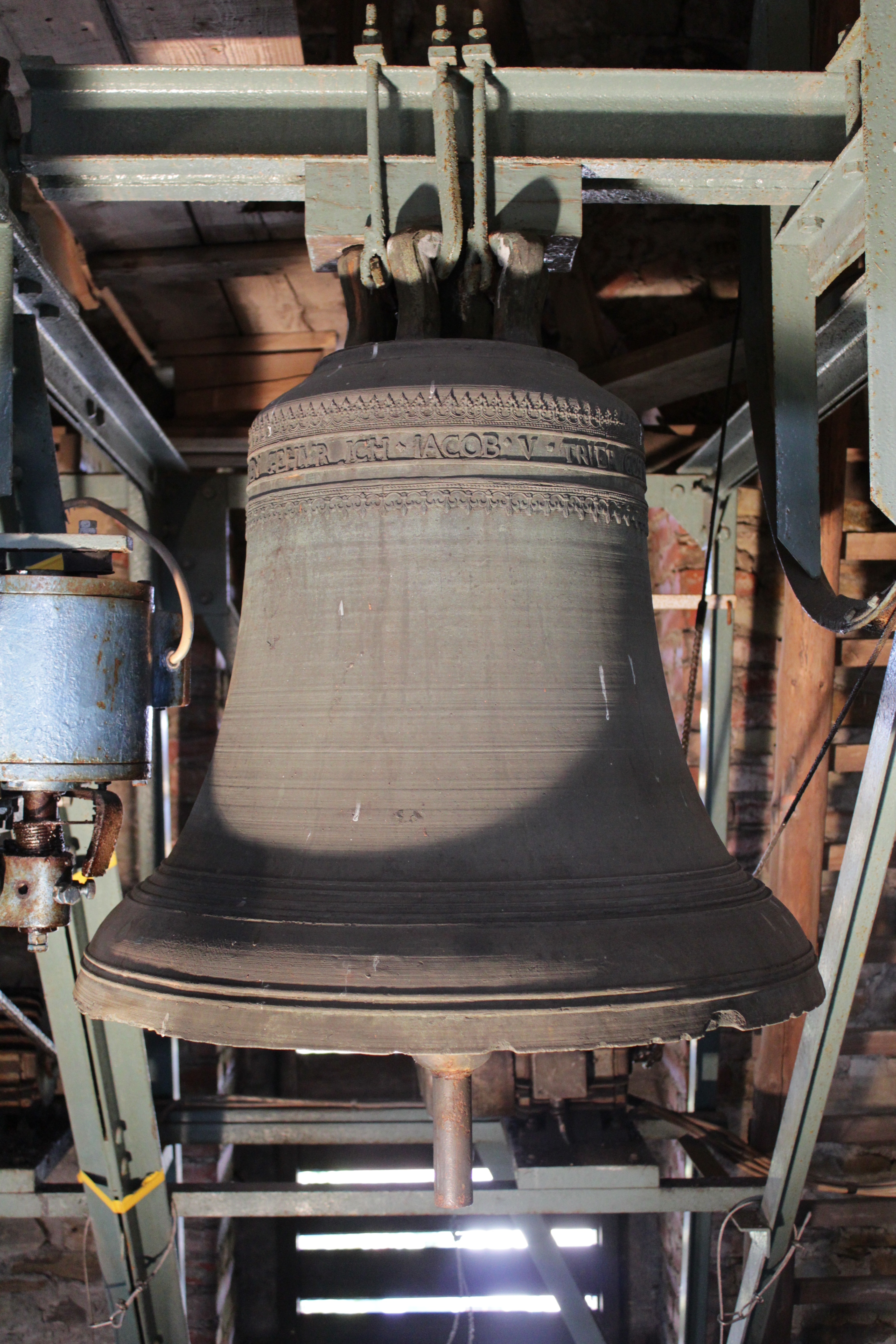 Die Michaelsglocke von St.Apollonia in Steckenborn wurde im Jahre 1652 von Jakob van Trier gegossen und befand sich ursprünglich in Wollseifen.